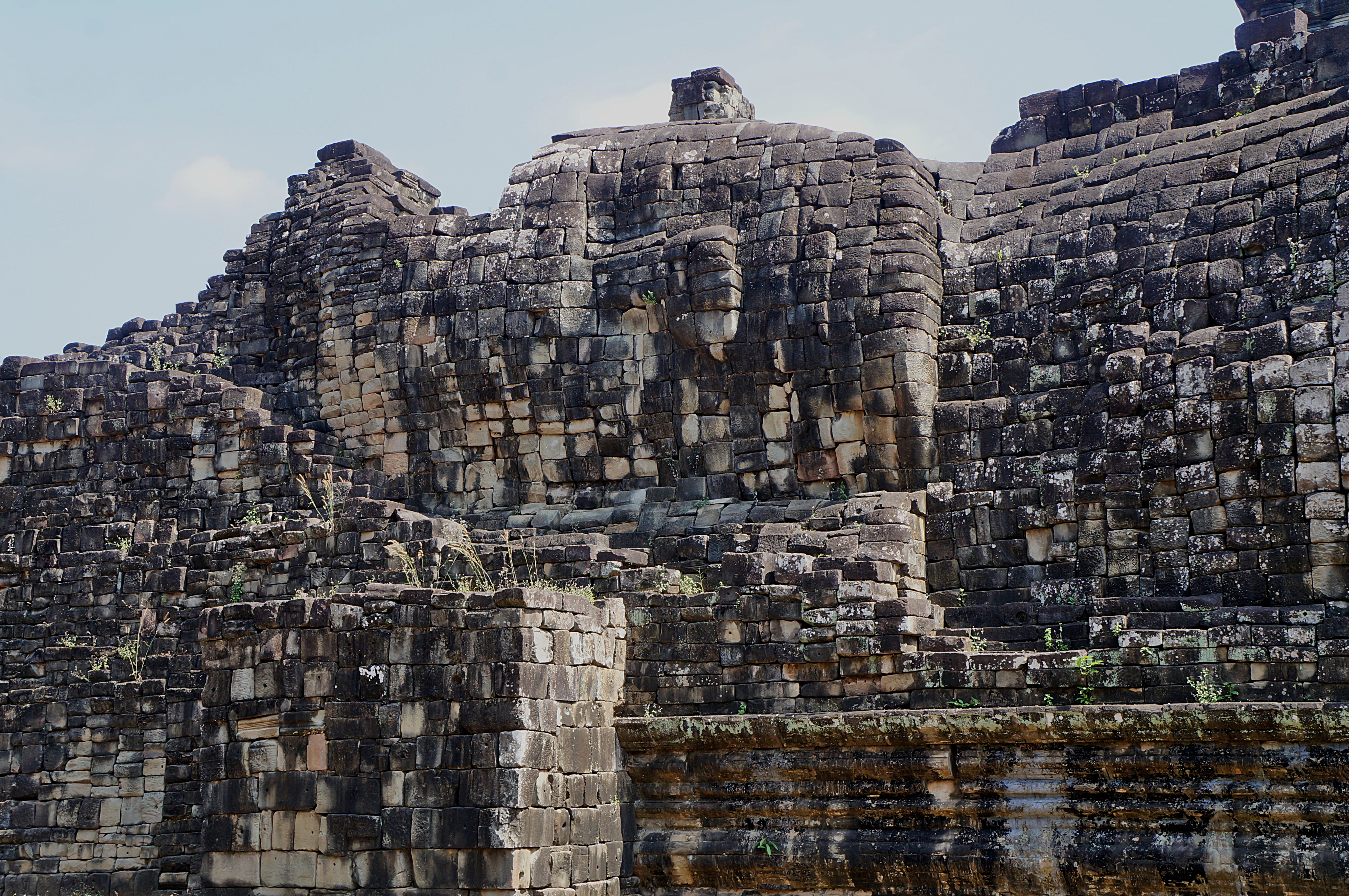 Les temples d'Angkor La Statue du Bouddha couché au temple de Baphûon Siem Reap (Cambodge